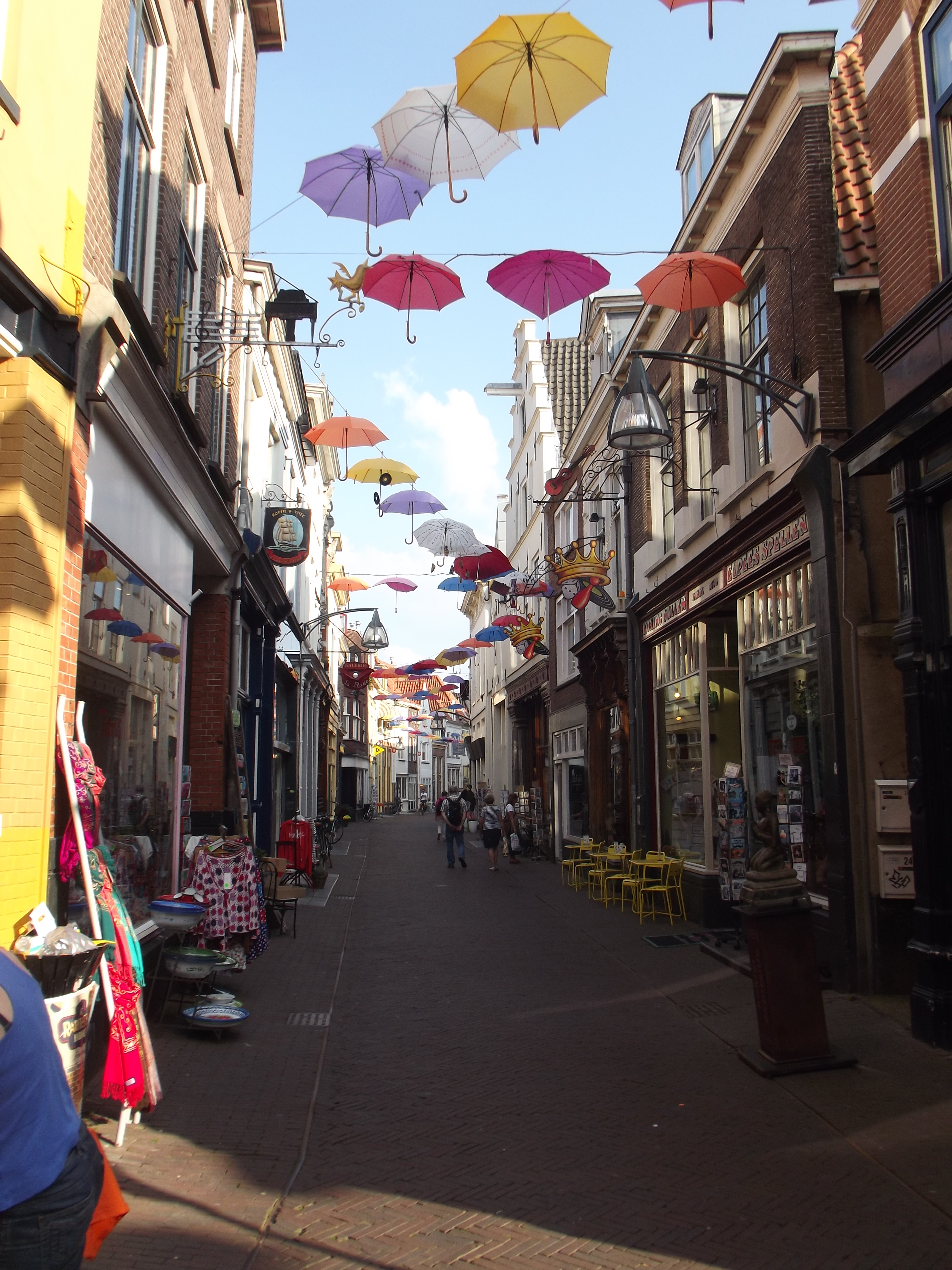 De Kleine Overstraat in Deventer versierd met paraplu's. zie project